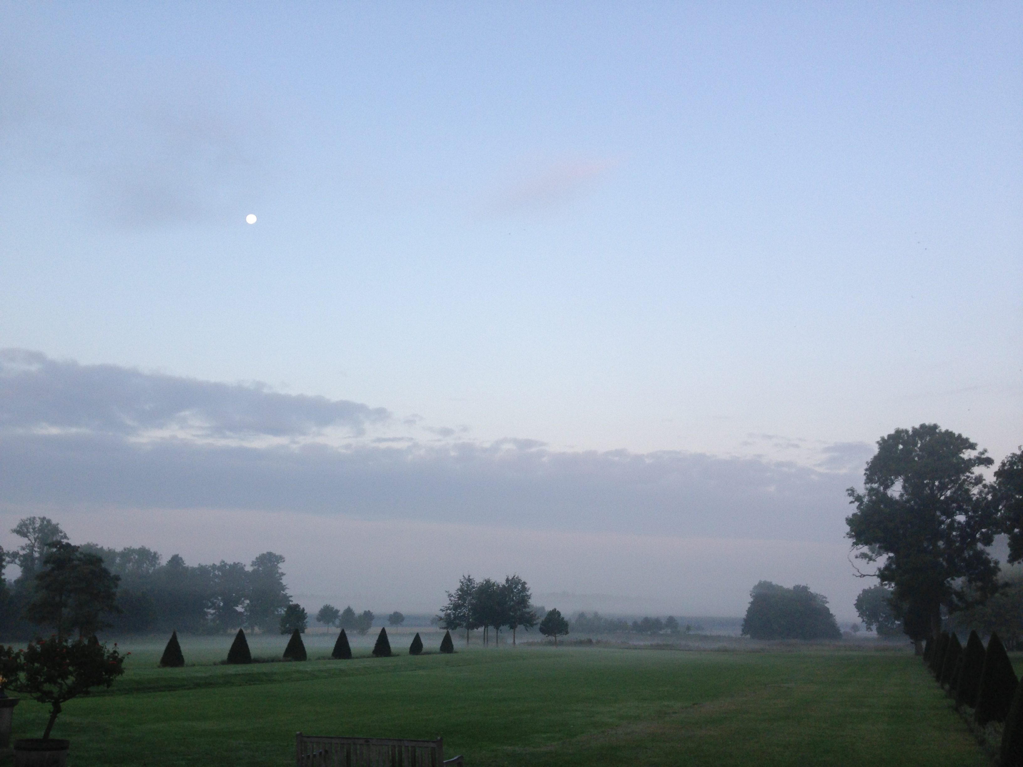 Deitsch: Der Park im Morgenlicht auf Gut Boldevitz, Rügen